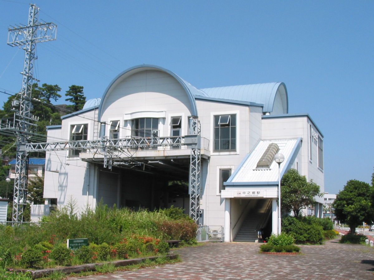 近鉄志摩線中之郷駅駅舎東口 2006/09/03 三重県鳥羽市鳥羽3丁目にて投稿者が撮影